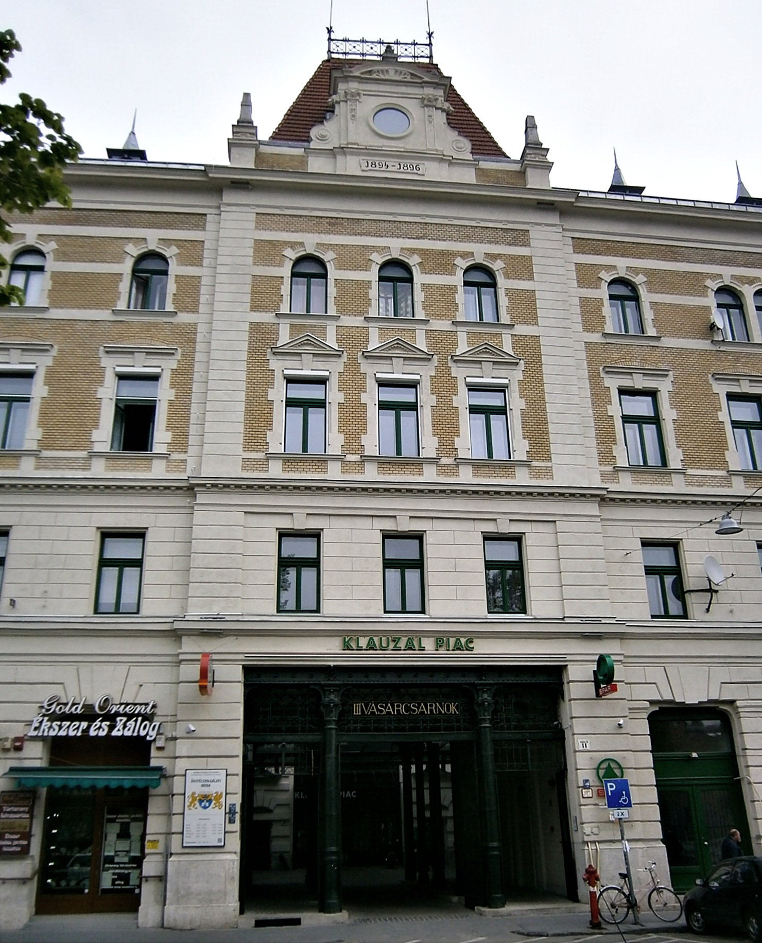 A budapesti Klauzál téri vásárcsarnok. (1072, Budapest, Klauzál tér 11.)